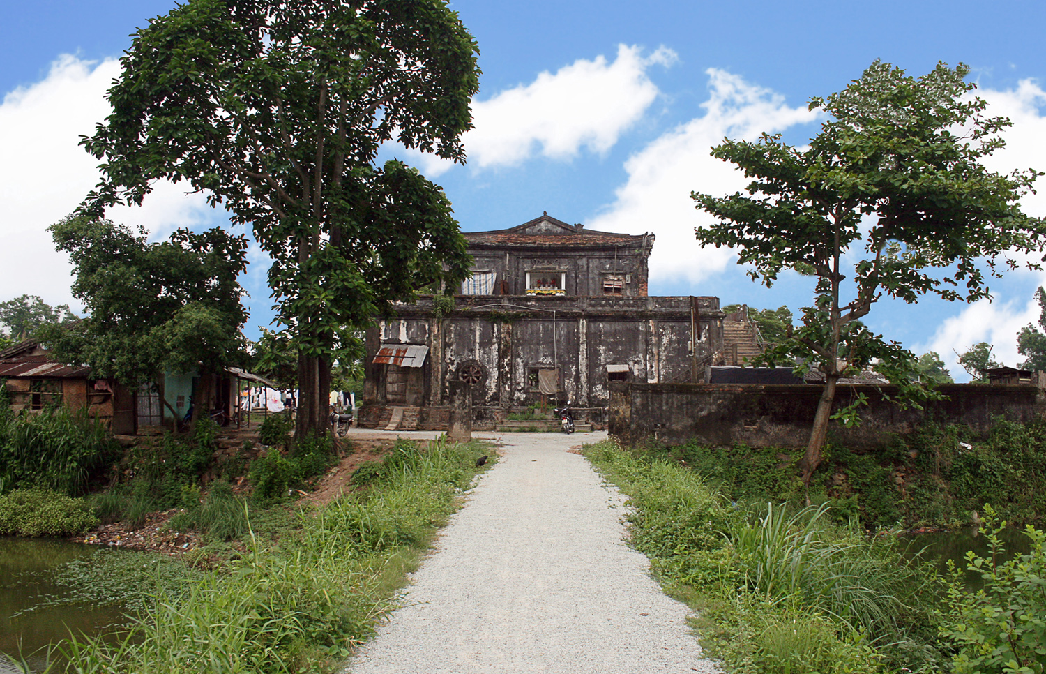 Tàng thư lâu tại Huế